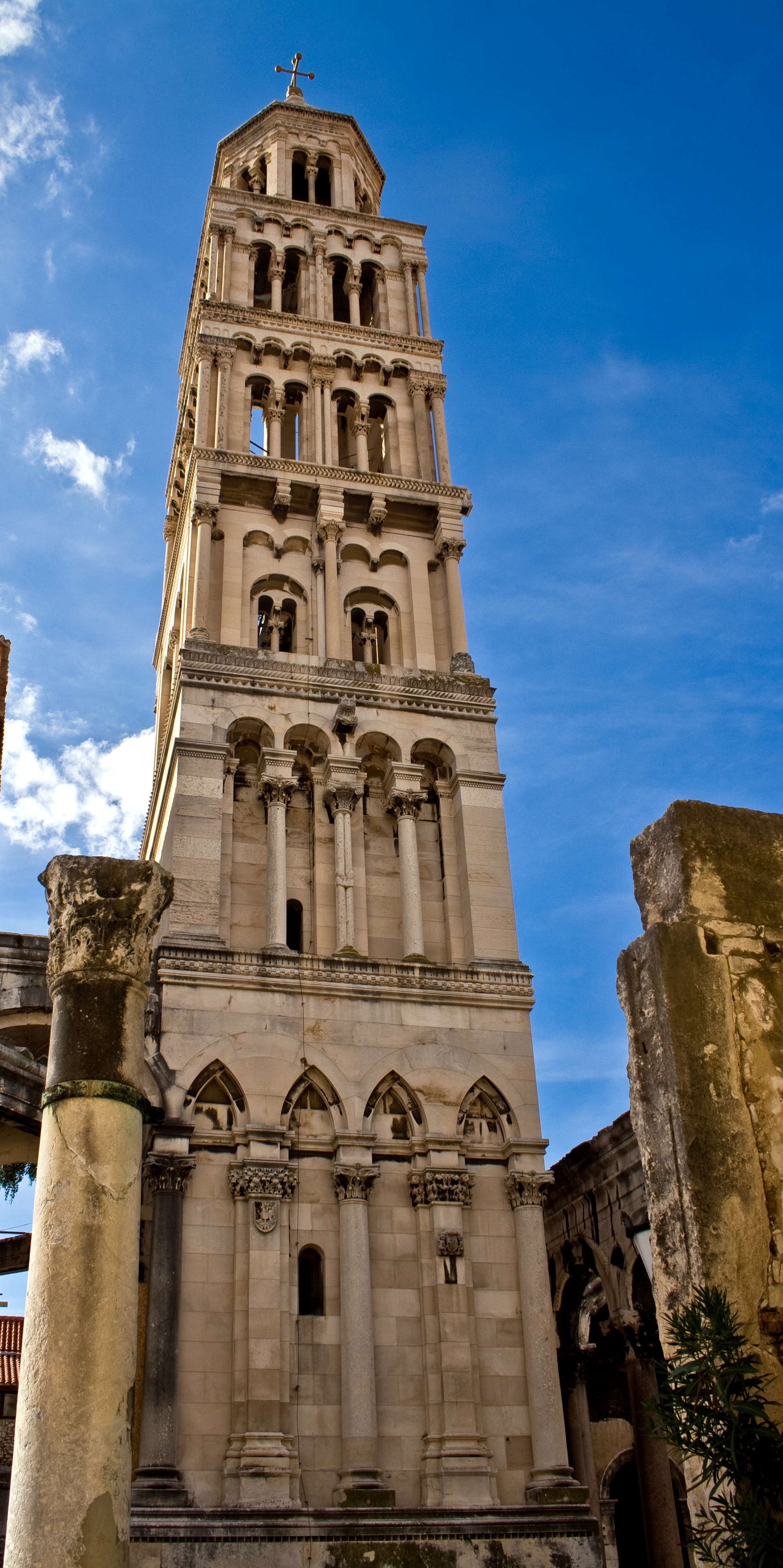 Split